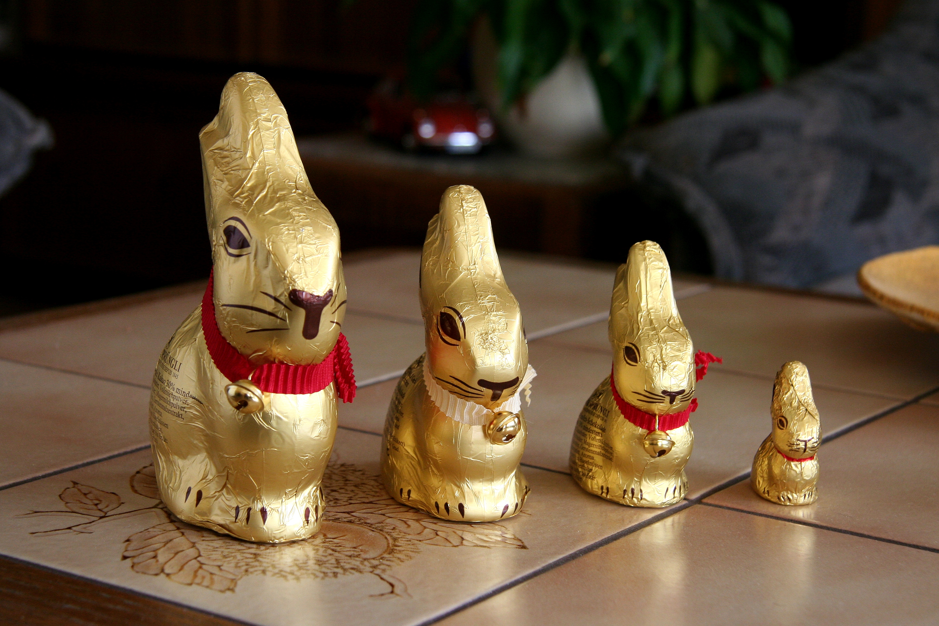 Lindt-Goldhasen in verschiedenen Größen